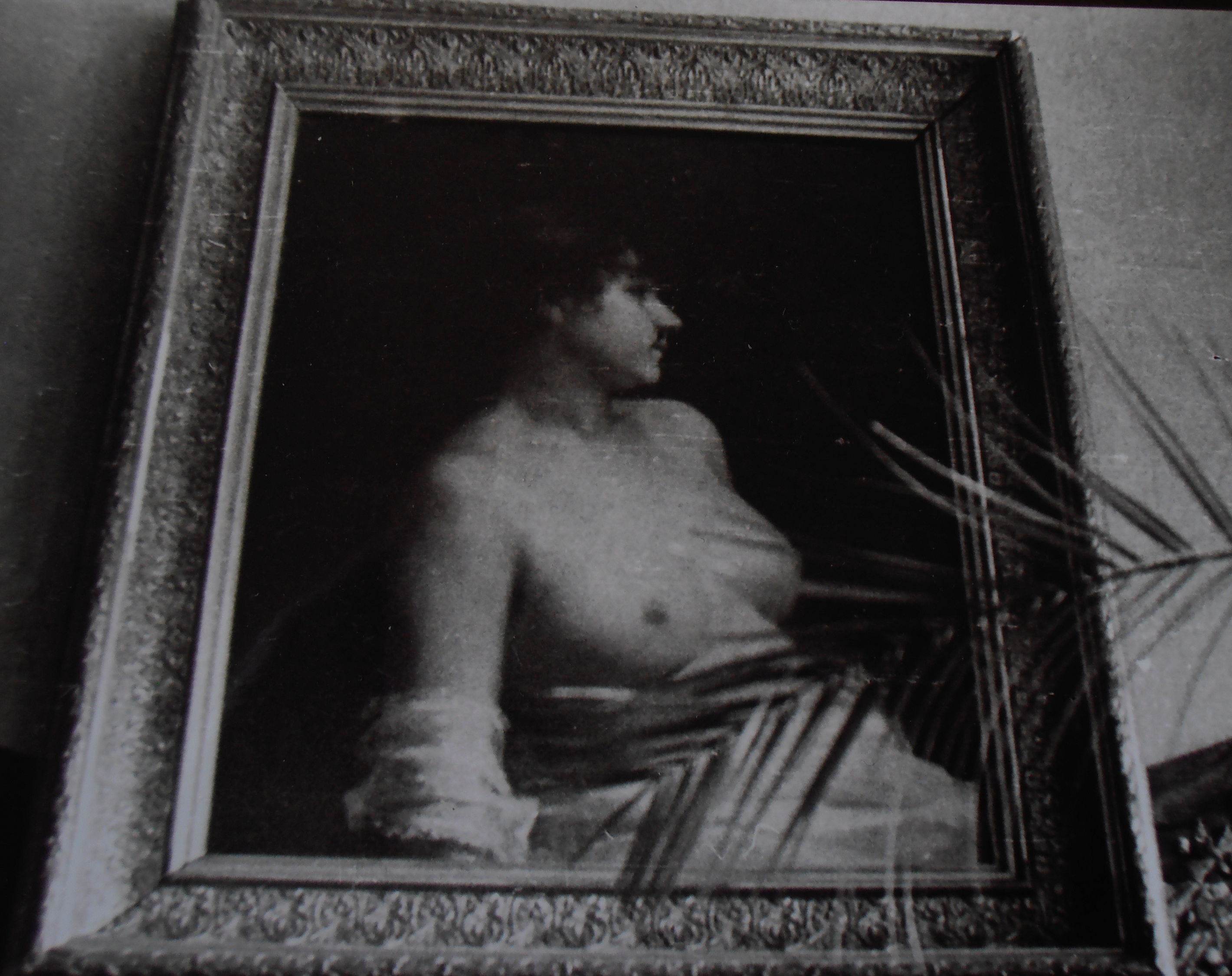 Dzieło zaginione podczas II Wojny Światowej (z kolekcji prywatnej w Warszawie)